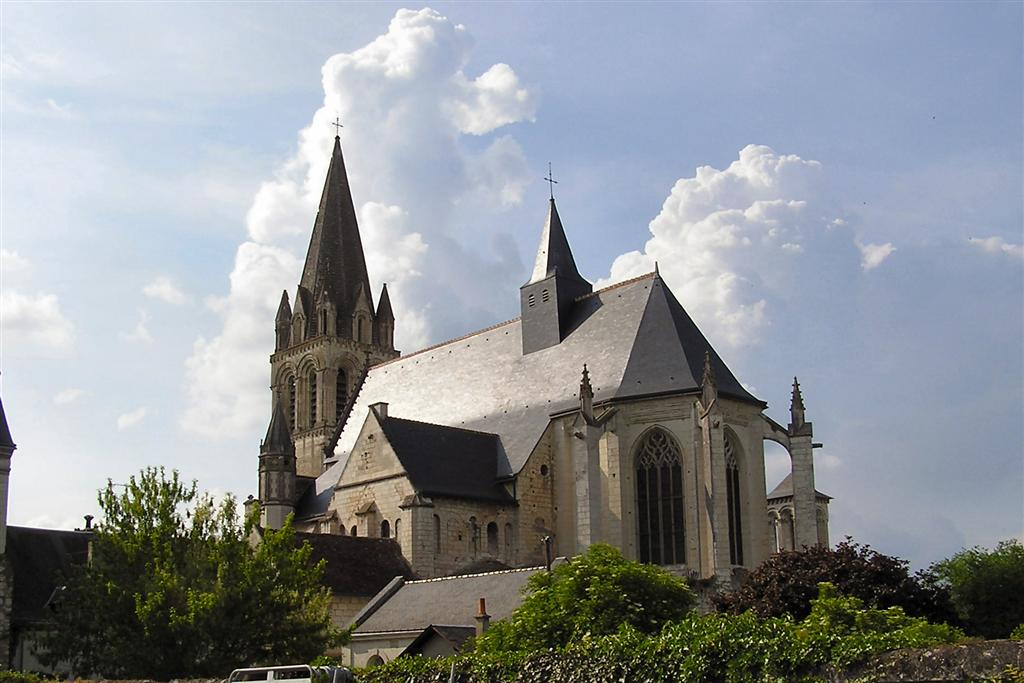 choeur de l'abbatiale de Beaulieu les loches (Tourraine)